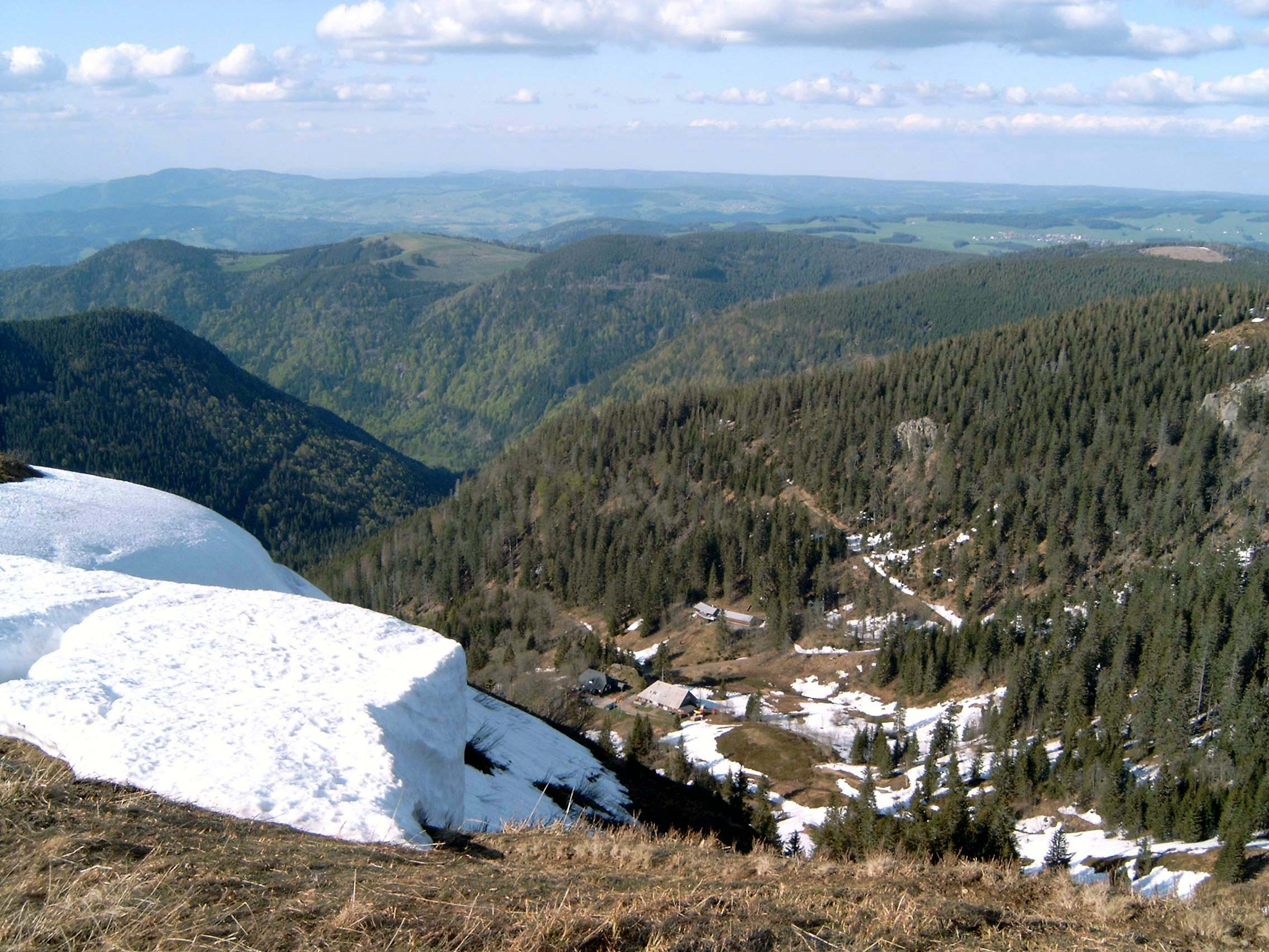 Blick vom Feldberg übers Zastler Tal, am Horizont links der Kandel